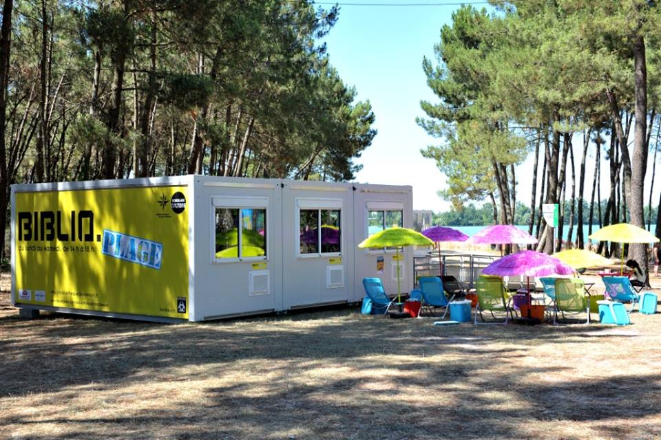 photo extérieure du Biblio.plage sur la plage du lac de Bordeaux